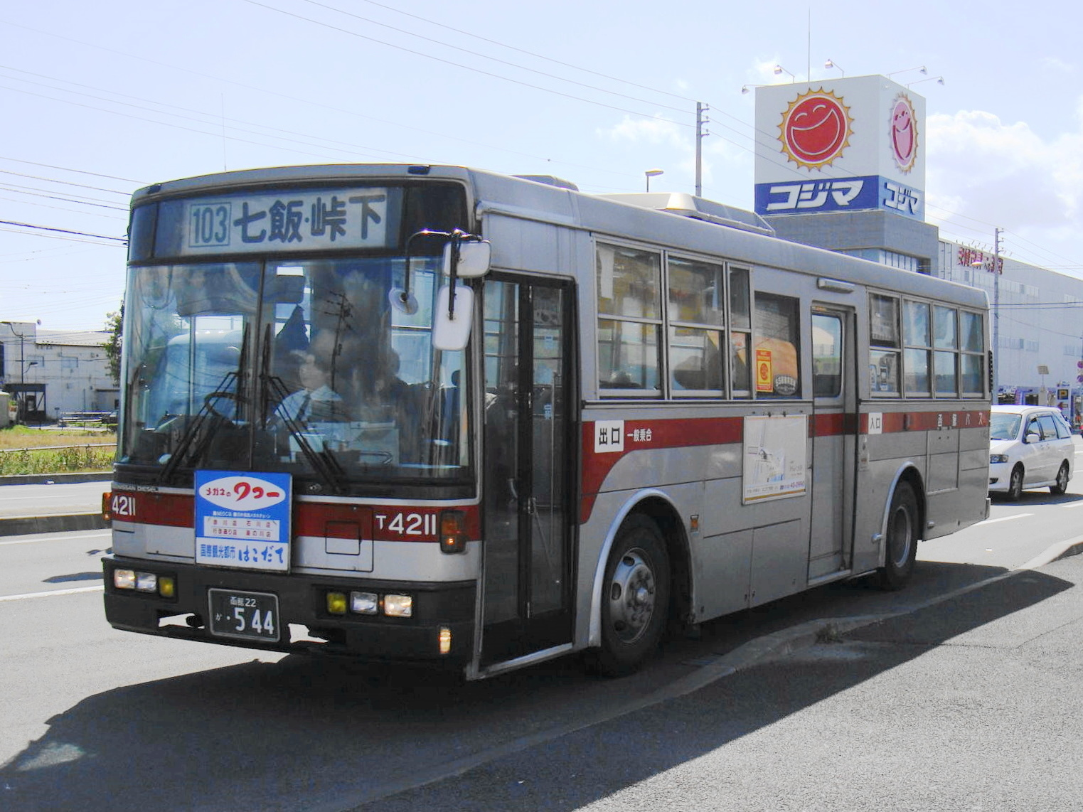 Hakodate to Tōgeshita